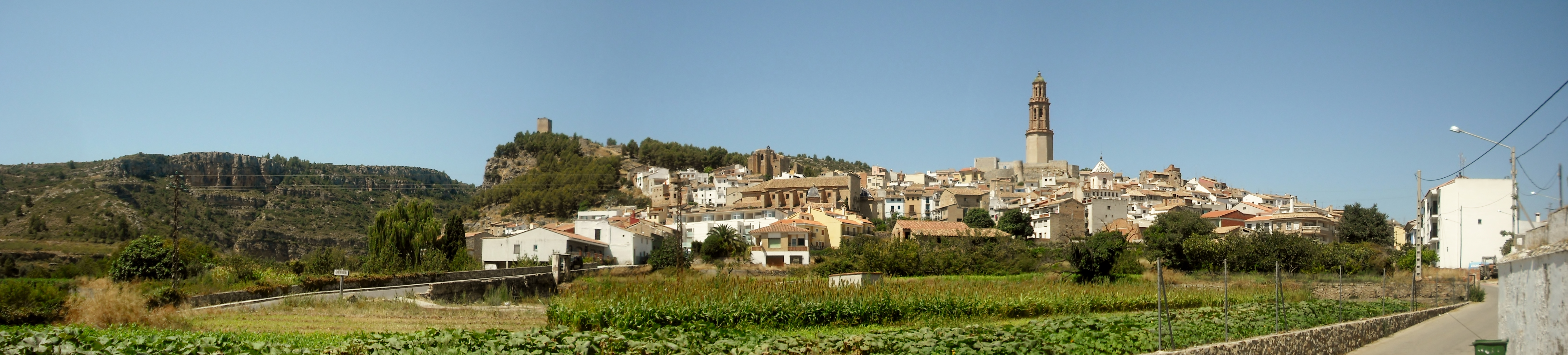 Xèrica.